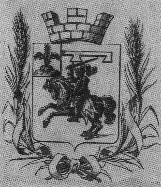 Беларуская (тарашкевіца): Герб Чэрыкава (Čerykaŭ)